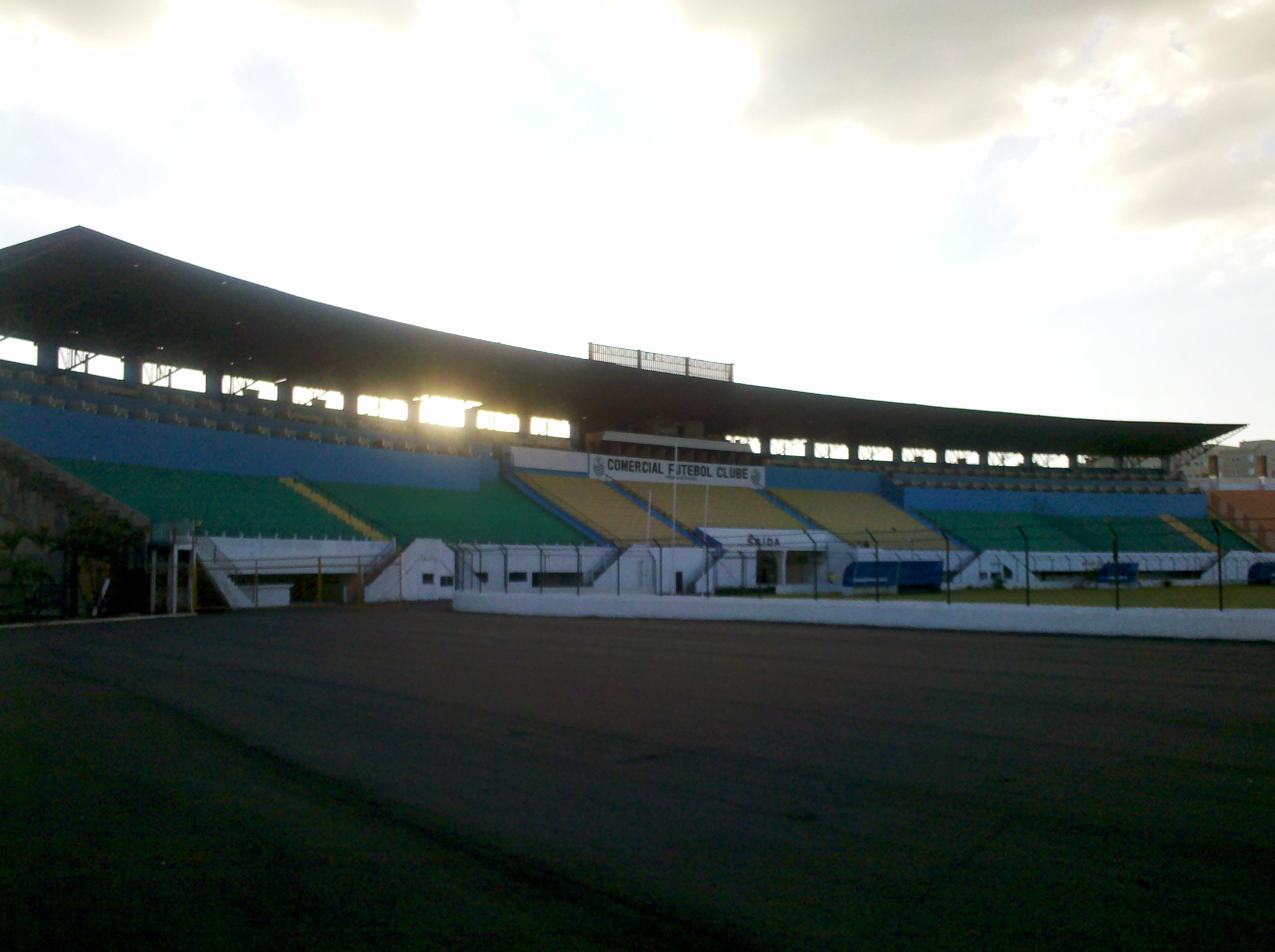 Cadeiras Cativas_Palma Travassos